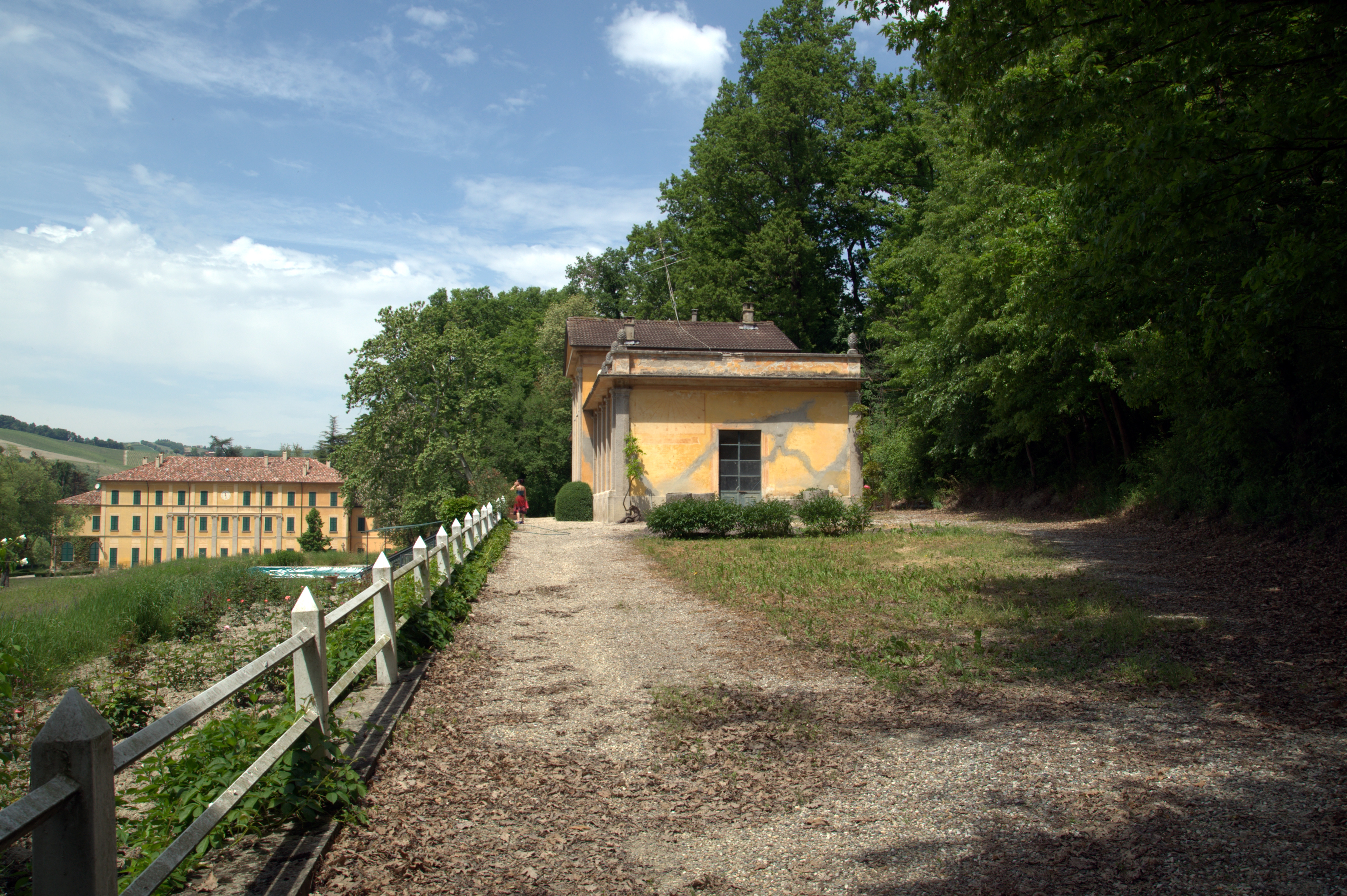 Veduta di Villa Fornace a Rocca de Giorgi - PV (Italia)